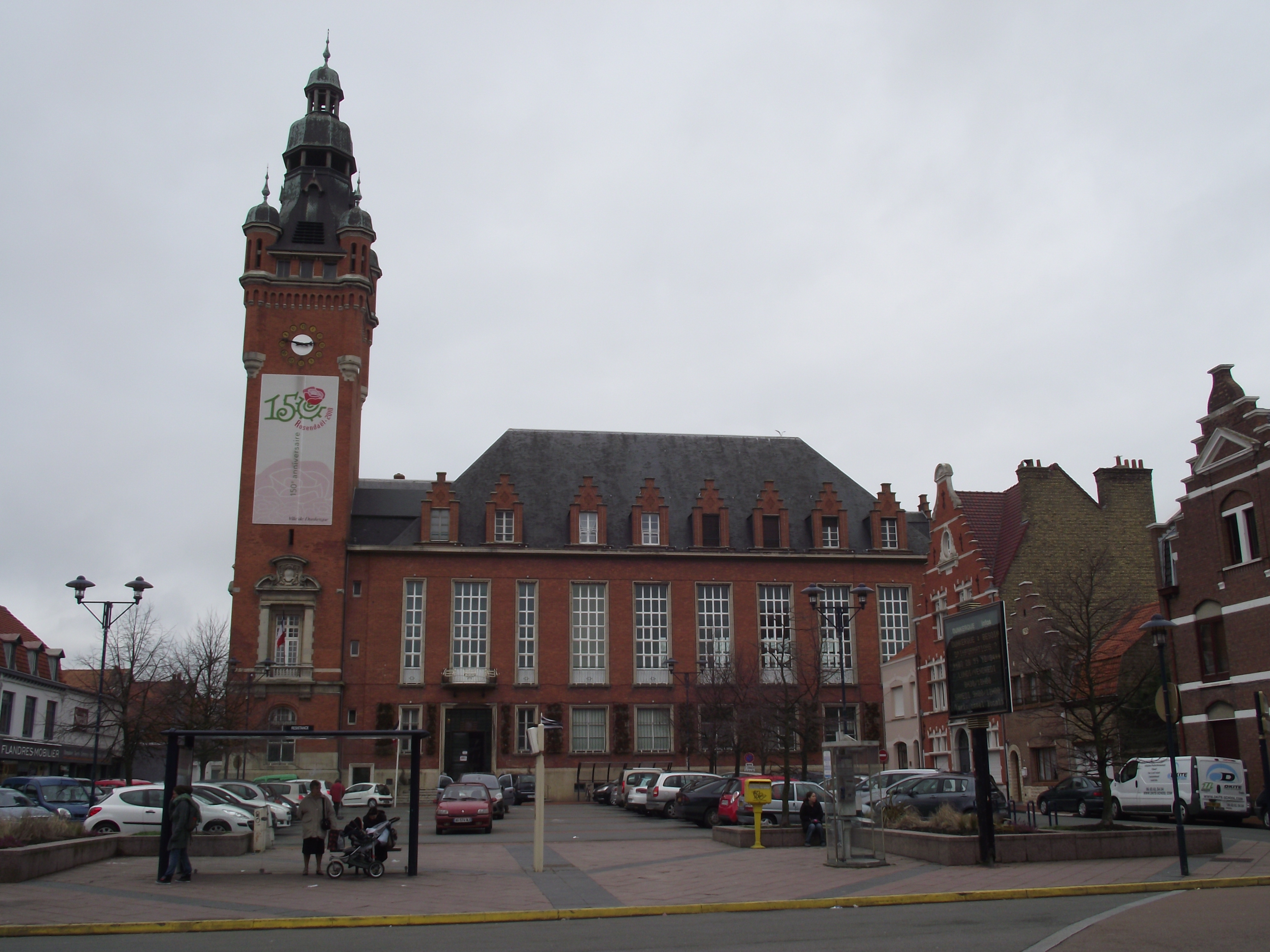 La mairie annexe de Rosendaël à Dunkerque